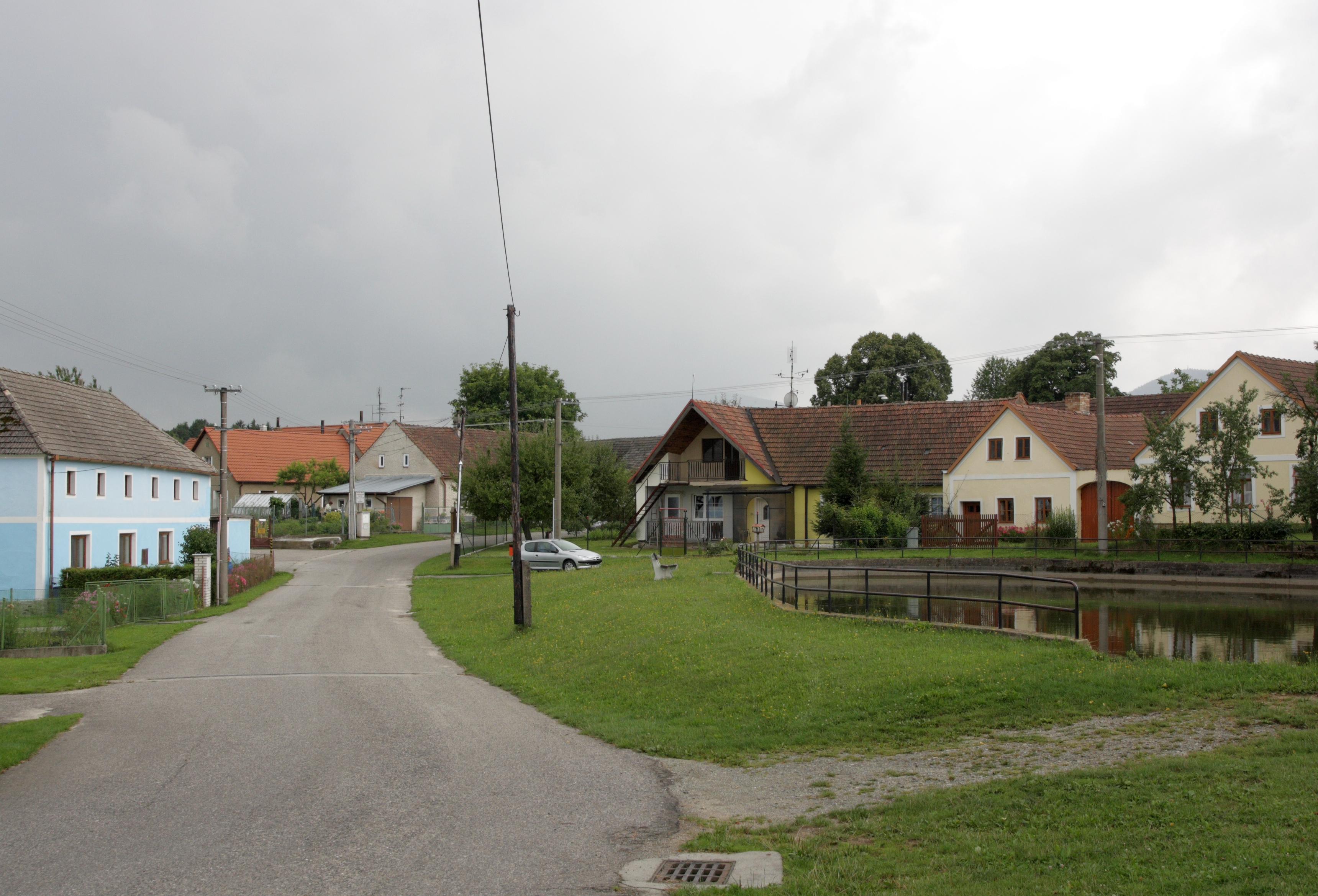 Humenice - náves.